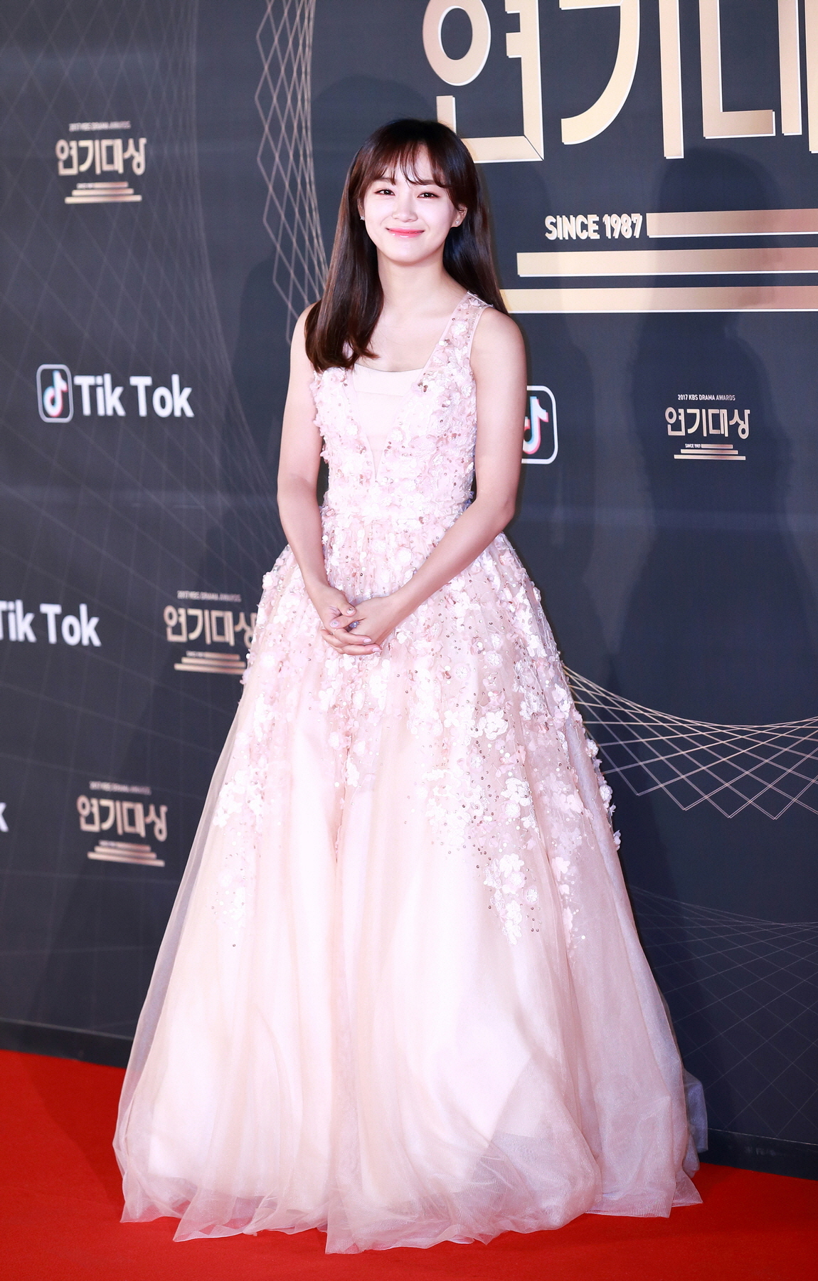 171231 구구단 세정 KBS 연기대상 레드카펫